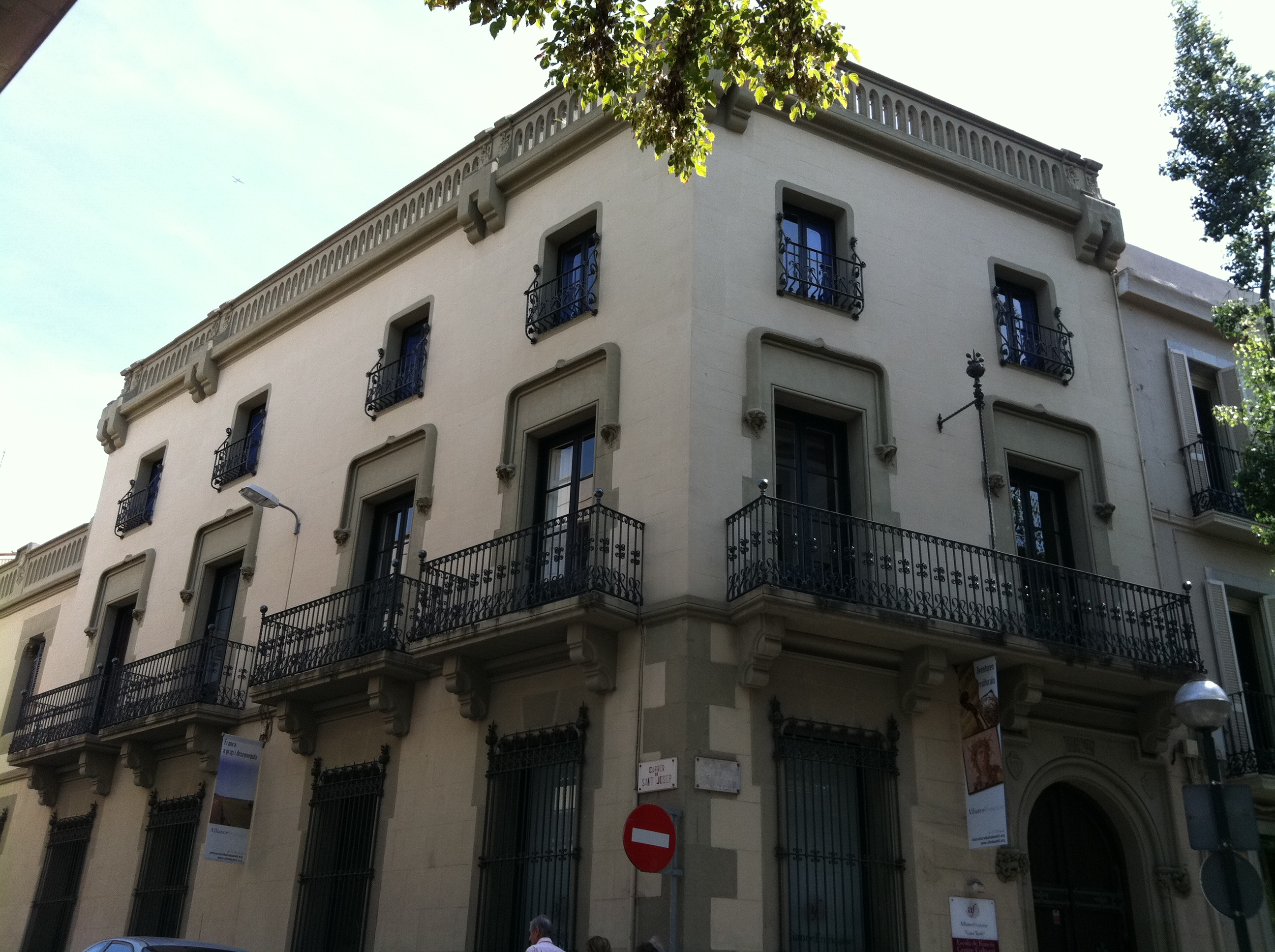 Casa Taulé, edifici que actualment és la seu de l'Alliança Francesa de Sabadell. Fou construït el 1902 com a casa pairal del fabricant de maquinària tèxtil Josep Taulé on va viure amb la família fins el 1958.